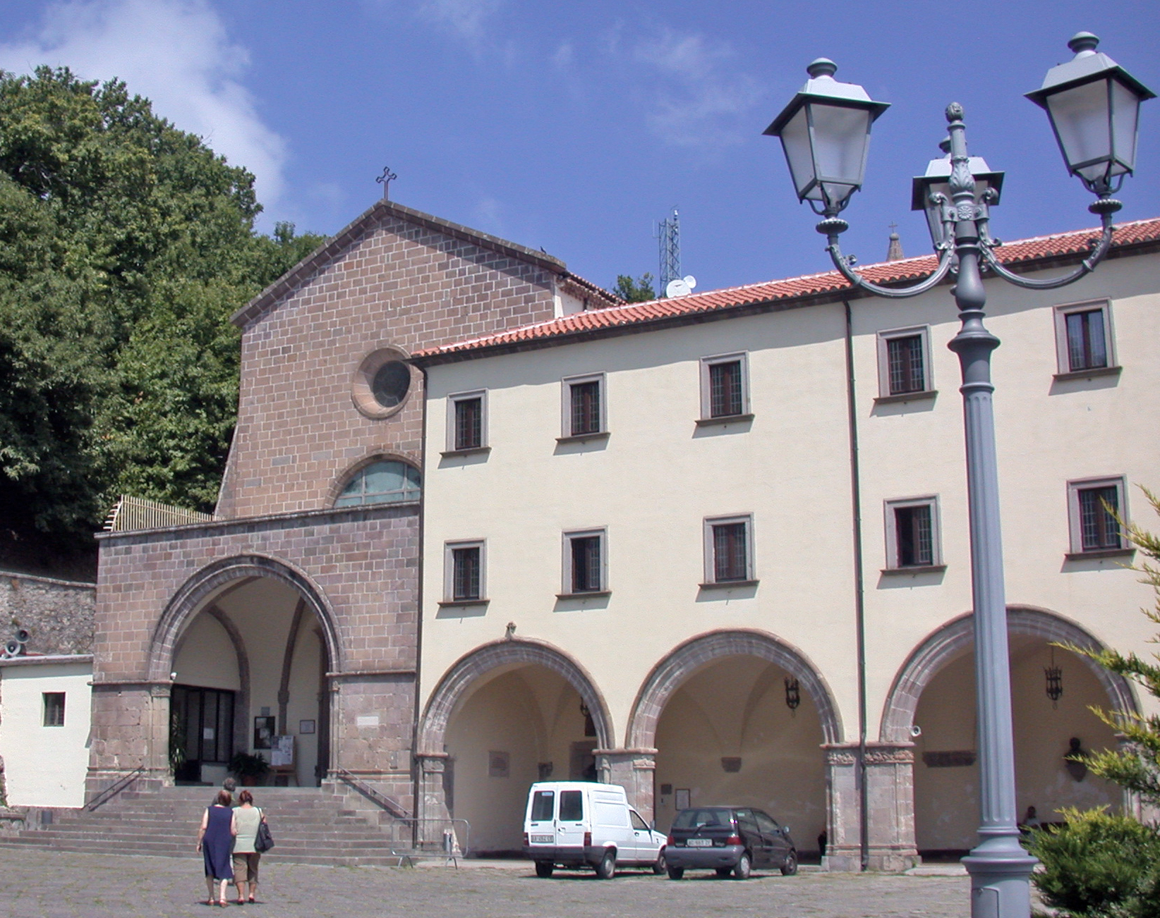 Italia, regione Campania, provincia di Caserta, Roccamonfina, santuario di Maria Santissima di Lattani, vista generale